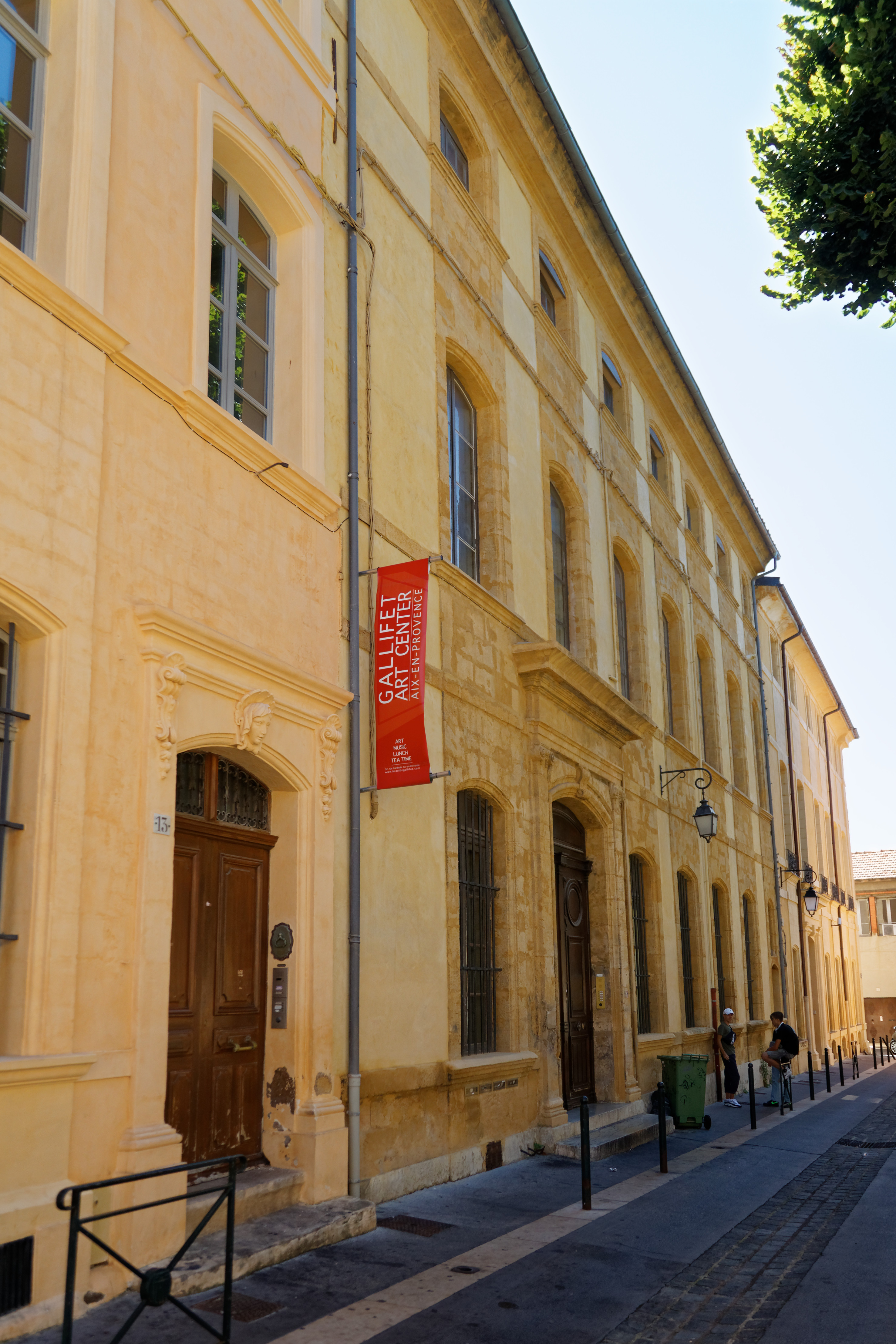 Hôtel de Gallifet, Sitz des Gallifet Art Center in Aix-en-Provence